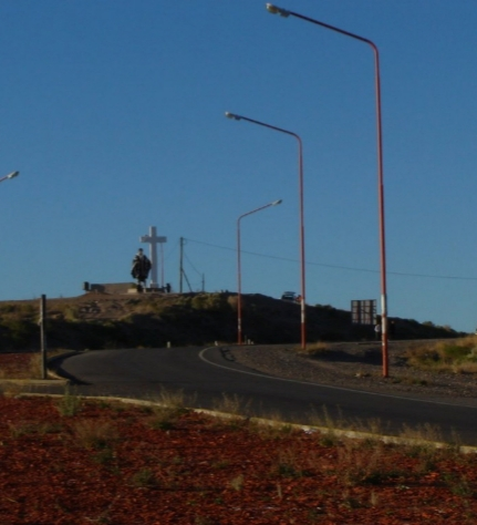 Ceferino Namuncura en el acceso norte a Catriel,Río Negro